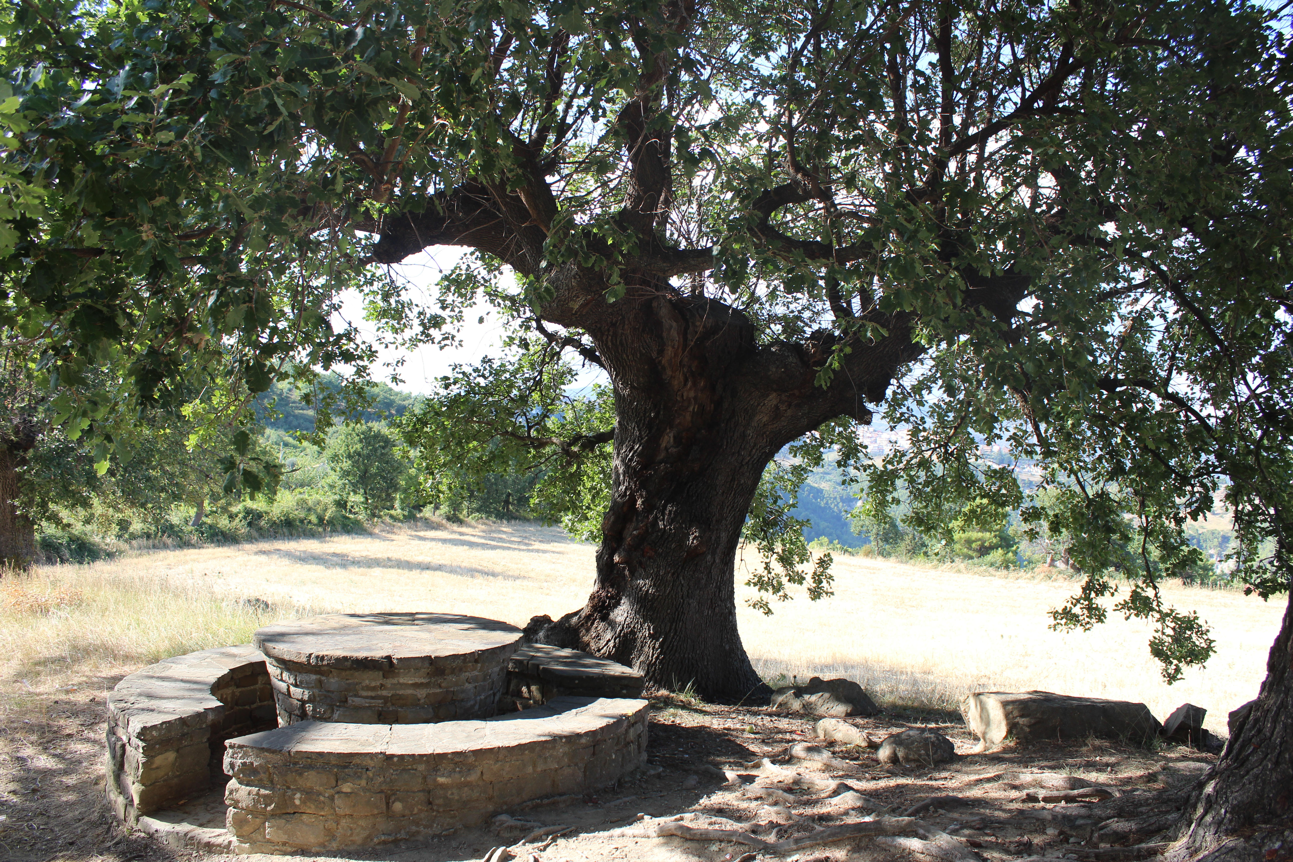 Verde attrezzato di Mastimaiore (Albidona).